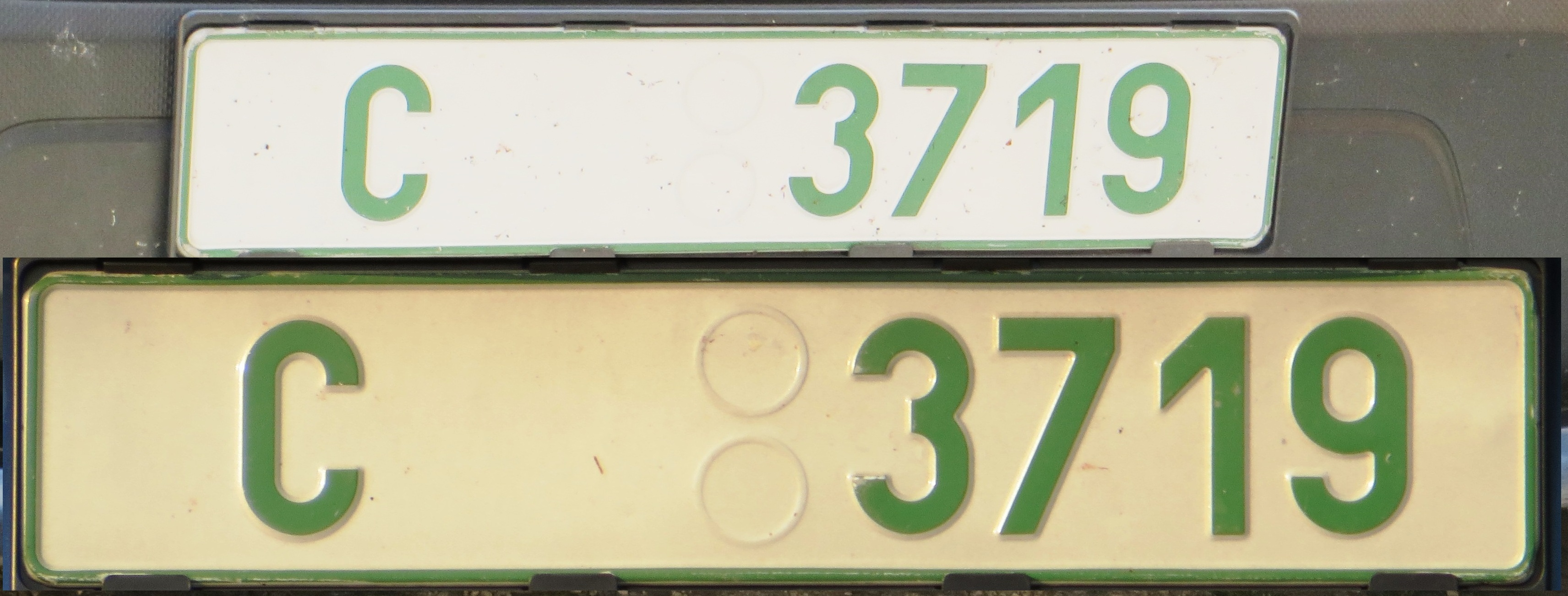 Handelaarskenteken Tjechië